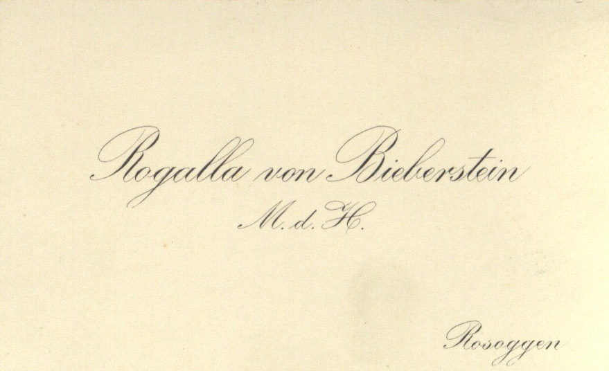 Card of Walter Rogalla von Bieberstein (1851-1914), Member of Preussisches Herrenhaus